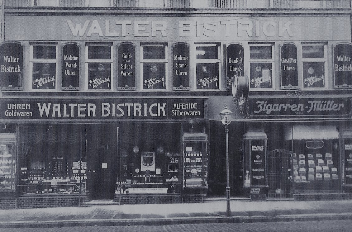 Juwelier- und Uhrengeschäft Walter Bistrick in Königsberg